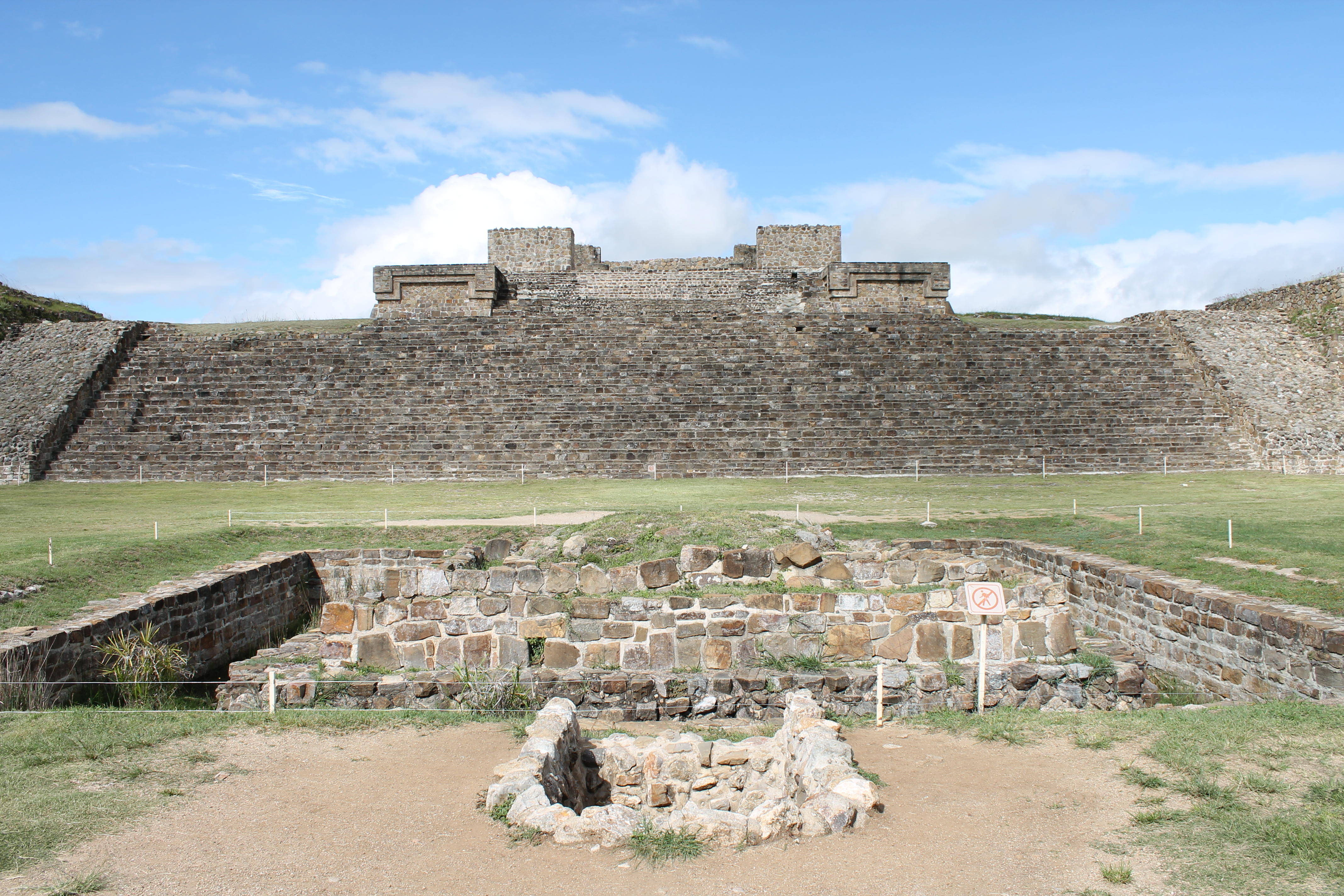 En la imagen se aprecia en primer plano el adoratorio ubicado justo frente al Edificio H de Monte Albán.